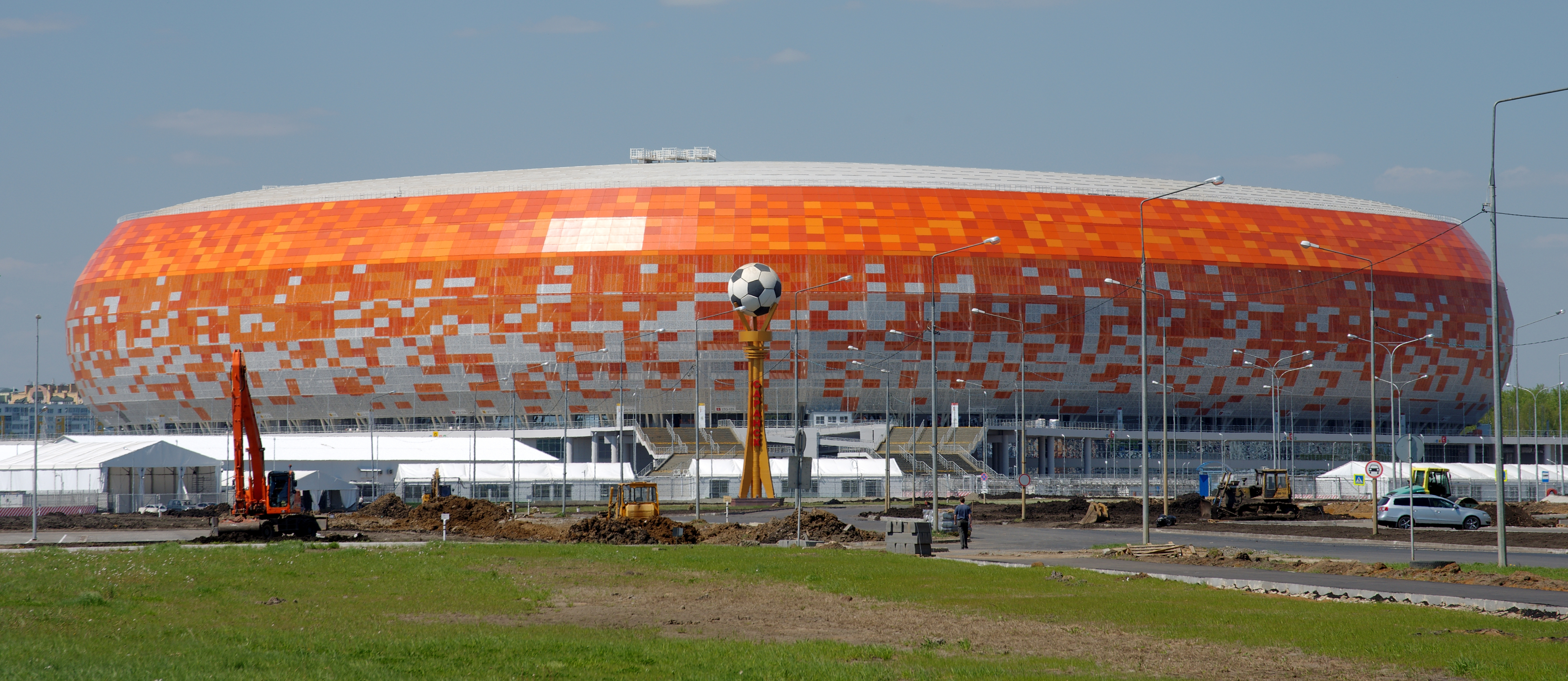 Вид на стадион с юго-востока.